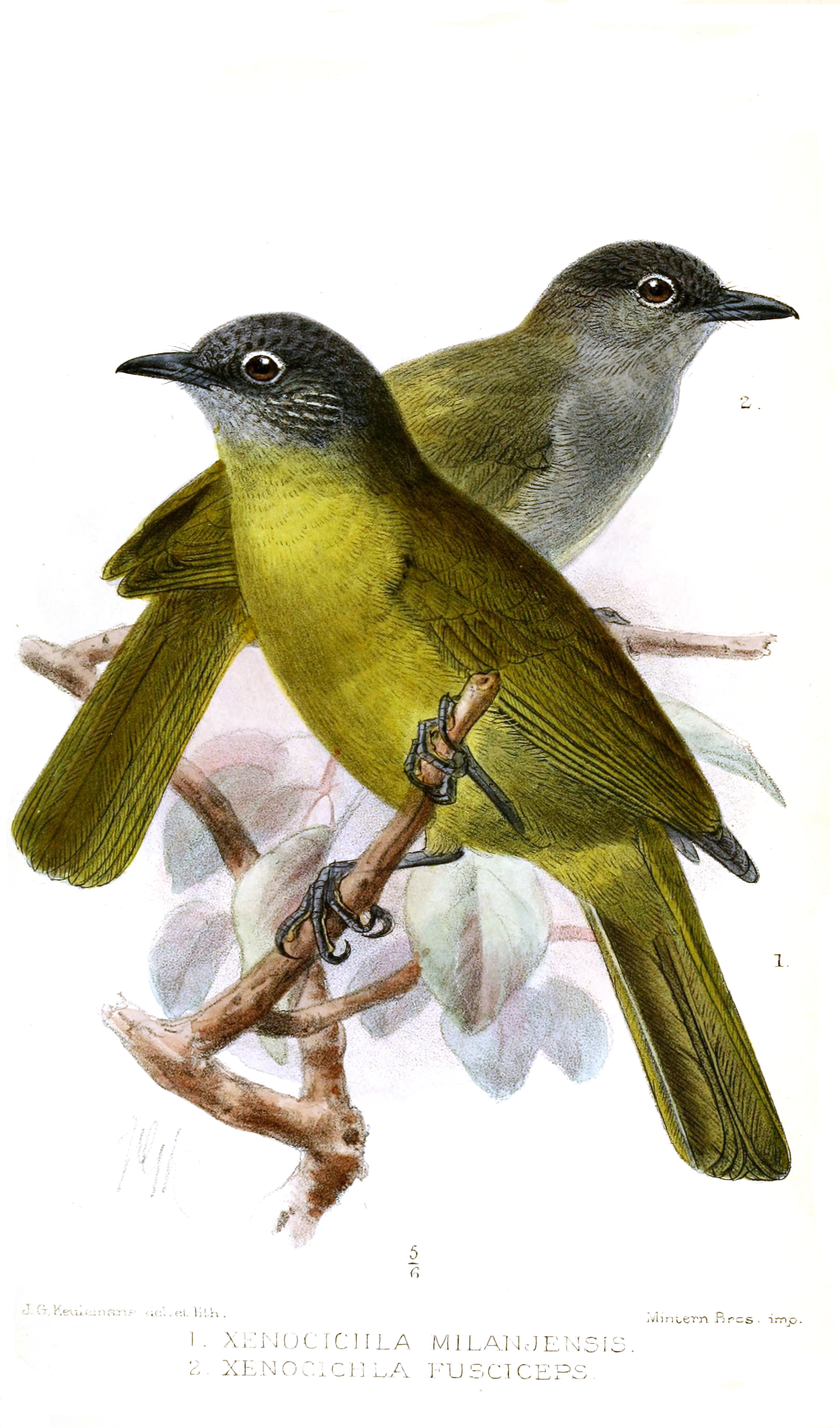 Xenocichla milanjensis = Andropadus milanjensis Xenocichla fusciceps = Andropadus fusciceps = Andropadus nigriceps fusciceps